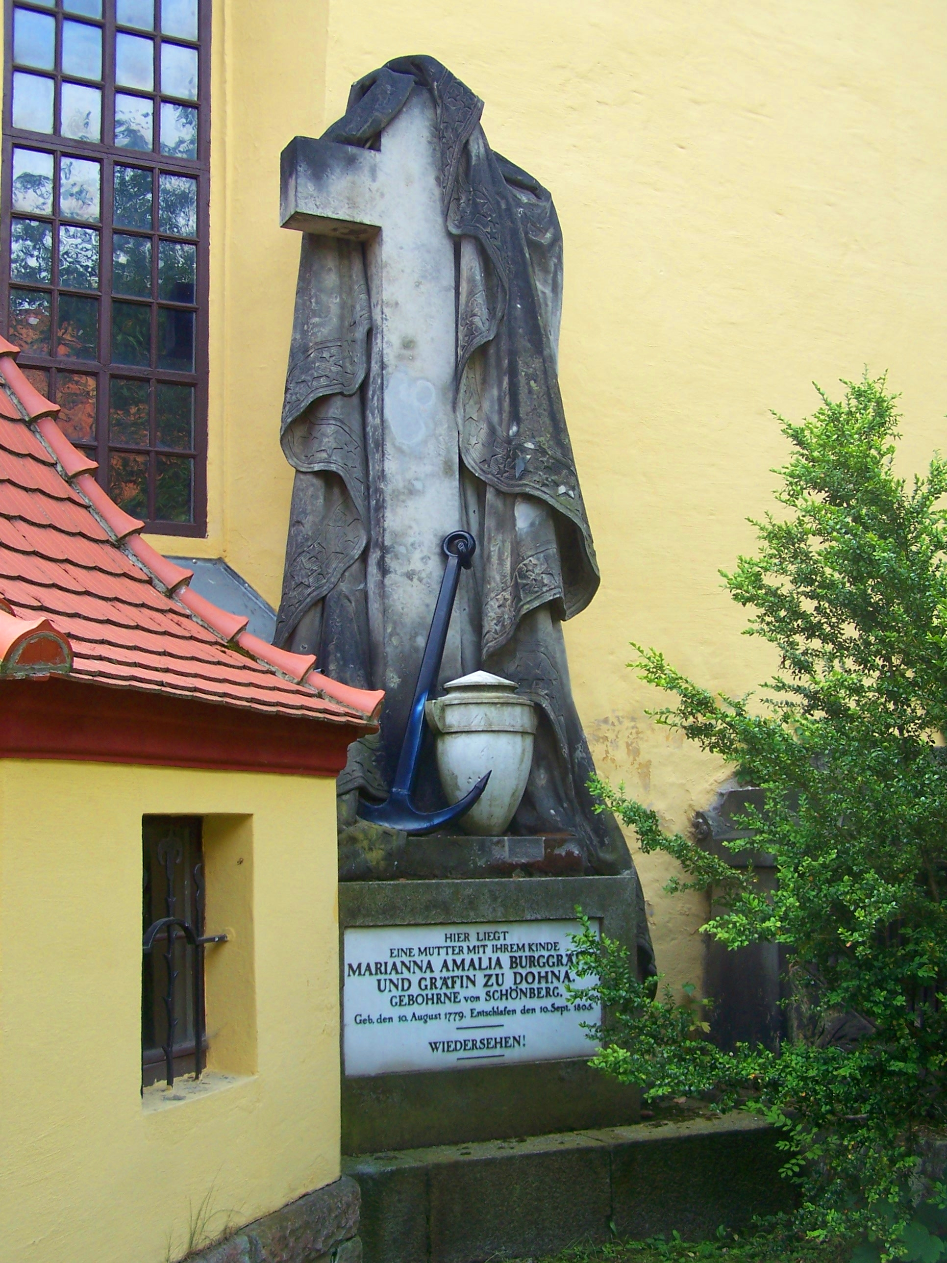 Grabmal Marie Amalia zu Dohna in Lausa (Dresden)